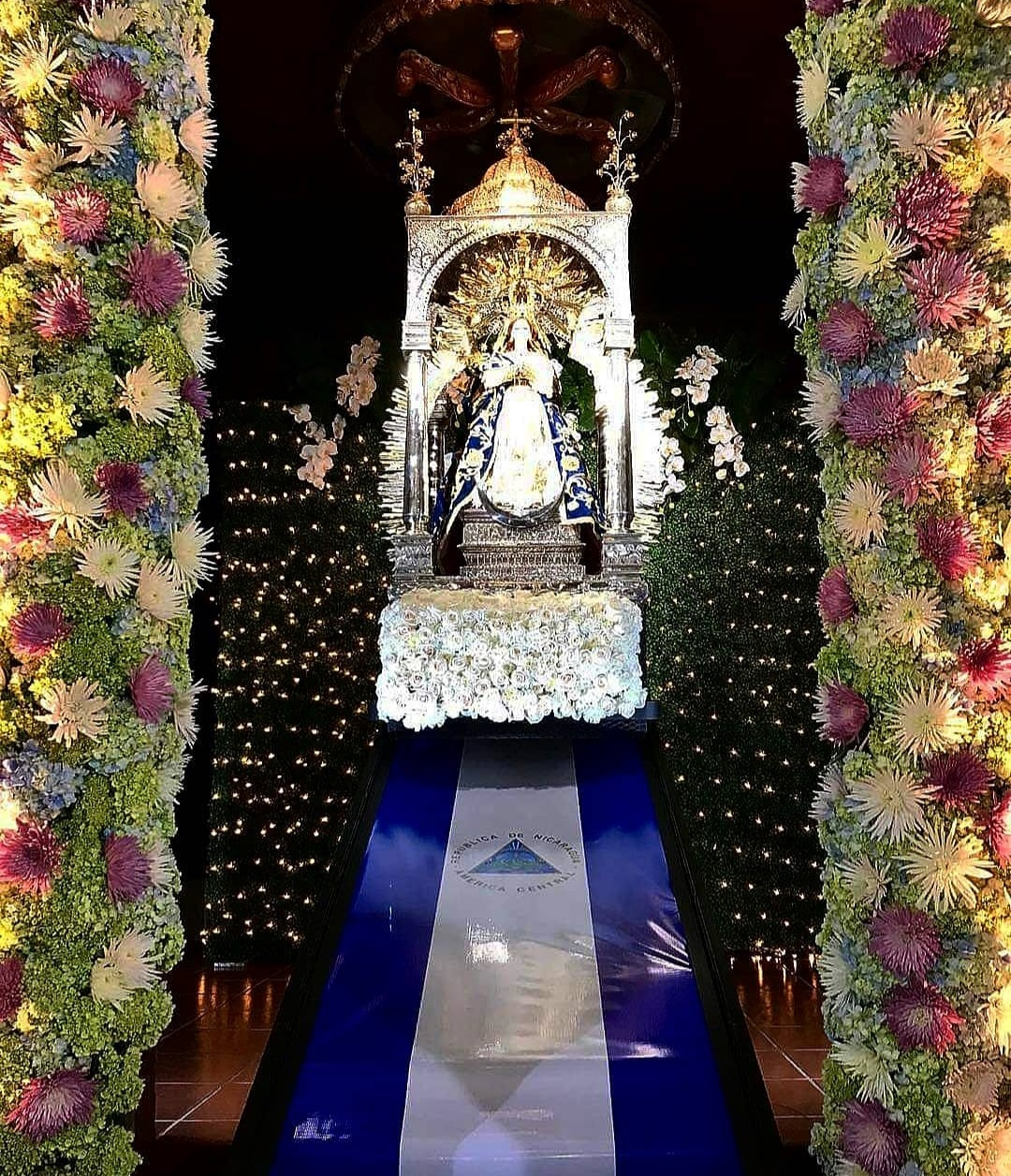 Imagen de la Virgen del Trono, patrona de Nicaragua.